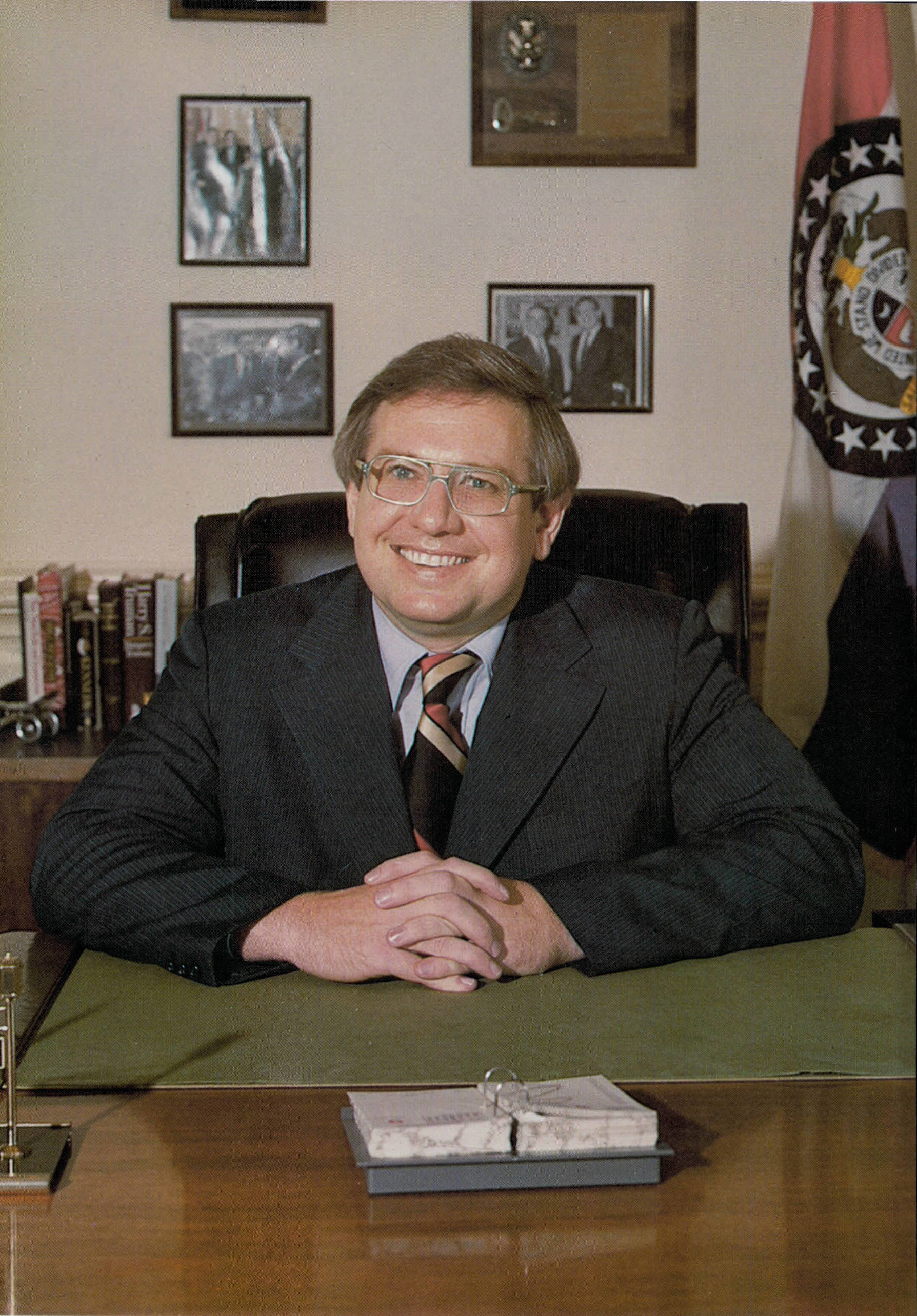 George W. Lehr, Missouri Auditor (1975–77)